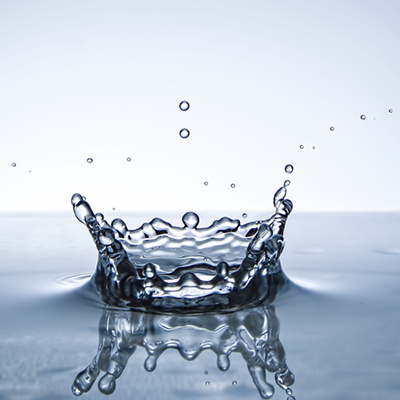 Wasserkrone